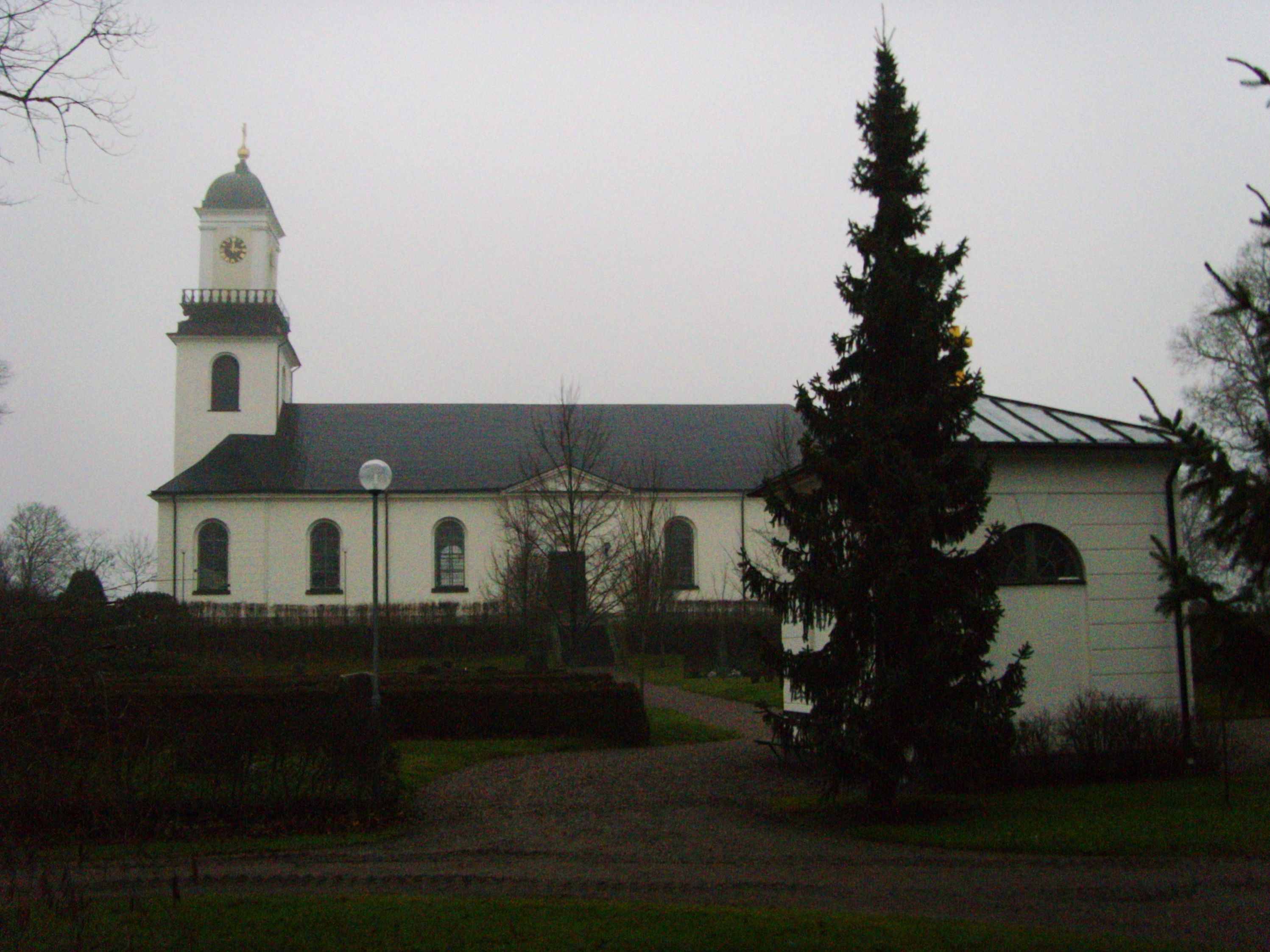 Östra Husby kyrka i Linköpings stift.